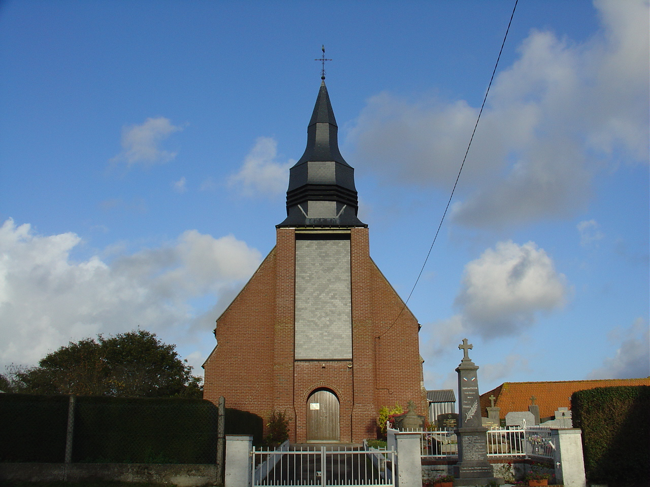 Église de Sains-lès-Fressin